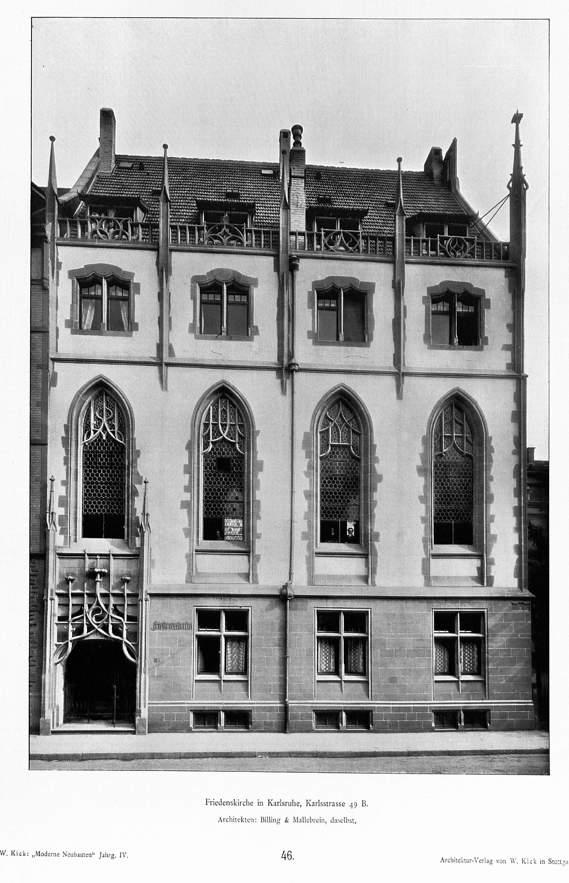 methodistische Friedenskirche in Karlsruhe, Karlstraße 49b; erbaut nach Entwurf der Karlsruher Architekten Hermann Billing und Josef Mallebrein; 1968 abgebrochen